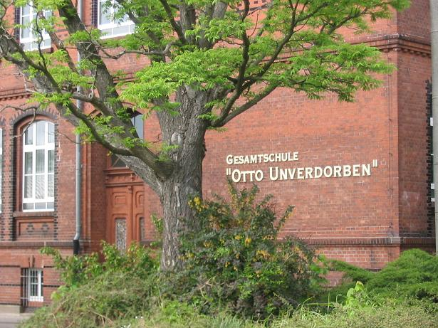 Gesamtschule "Otto Unverdorben", Dahme/Mark, Brandenburg Der Name geht zurück auf den Niederlausitzer Apotheker "Otto Unverdorben", der 1826 das Anilin erfand.